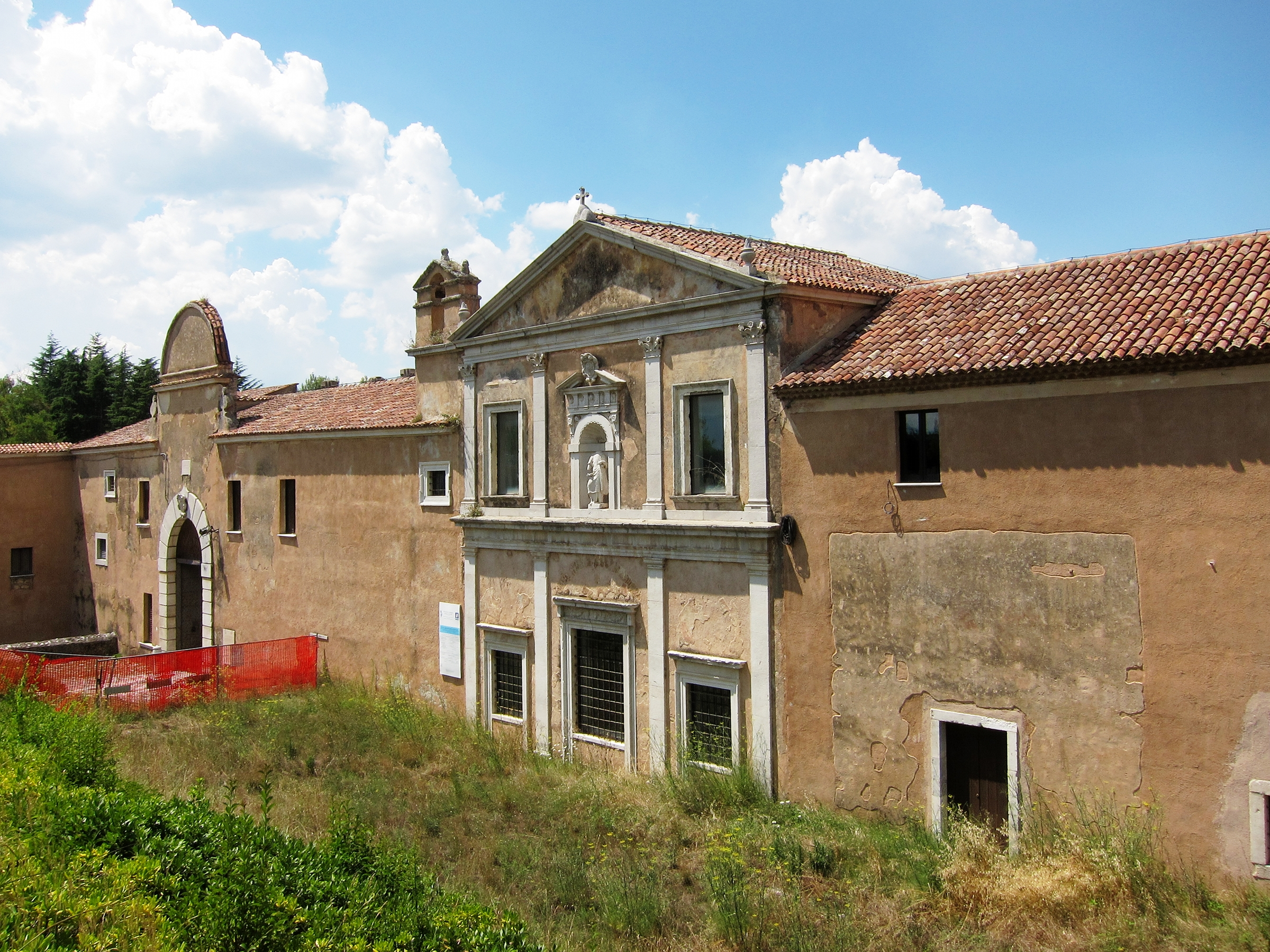 Le porche d'entrée de la Certosa di San Lorenzo (Padula).